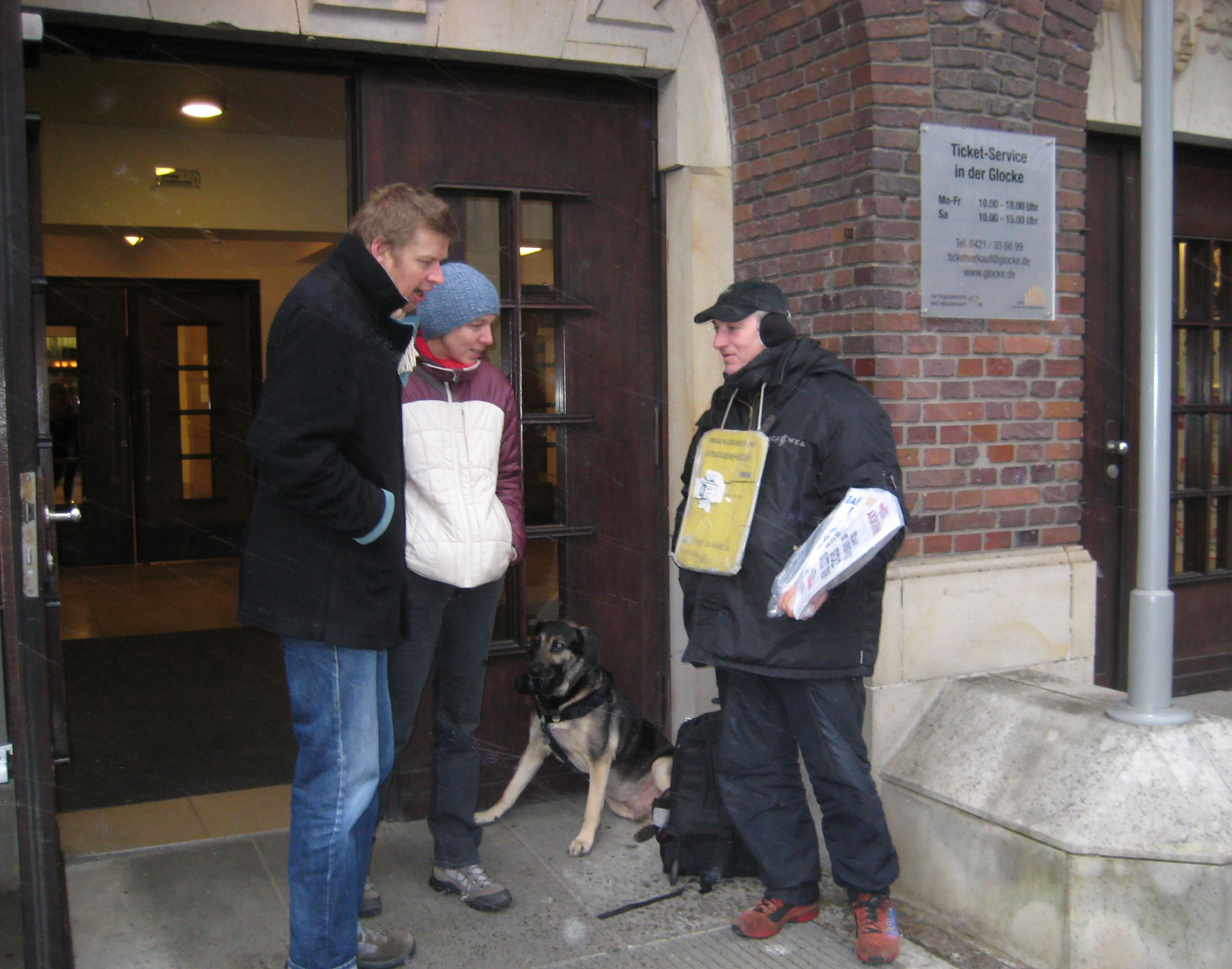 Verkauf des bremischen Straßenmagazins Zeitschrift der Straße in der Bremer Innenstadt, hier auf der Domsheide vor dem Konzerthaus Die Glocke (Stammverkäufer Bernhard Richter beim Verkaufsgespräch mit interessierten Passanten).